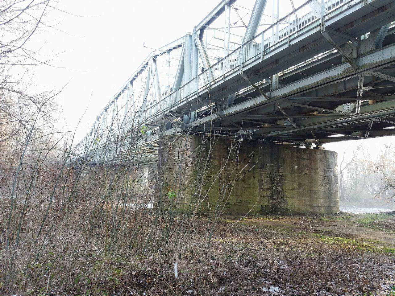 A Sávolyi-híd a helembai dunapartról